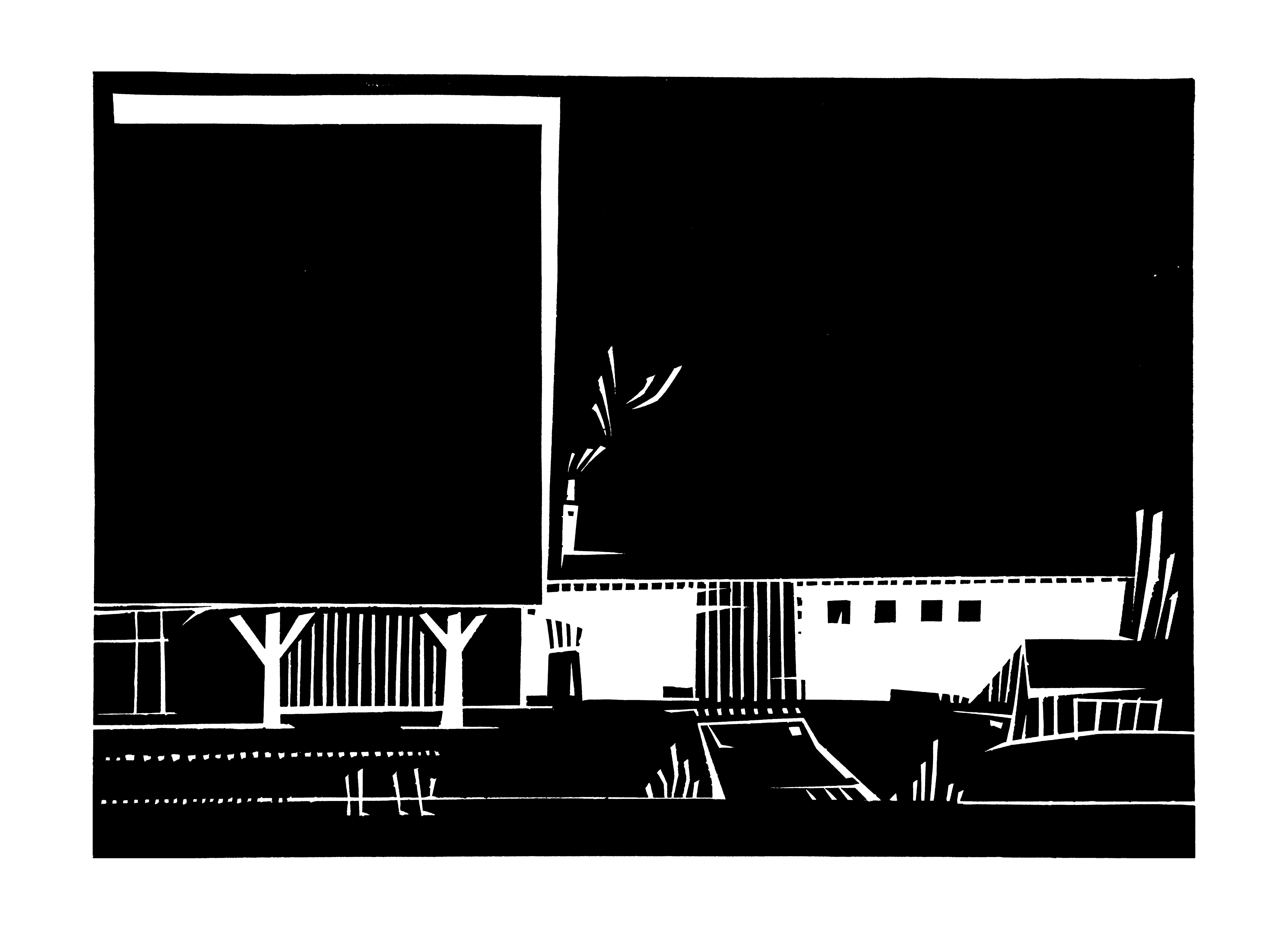 Werner Baumann, "Hohenloher Bauernhaus", Linolschnitt, 1972, 29,5cm x 42cm